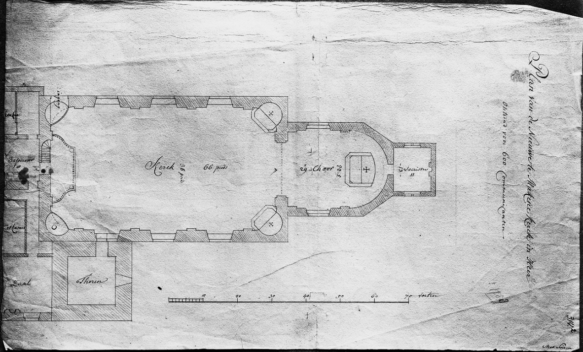 Reproductie van tekening door Mathias Soiron (uit 1786?) van de nieuwe parochiekerk van Heer, gebouwd van 1788-89. Rijksarchief Maastricht.